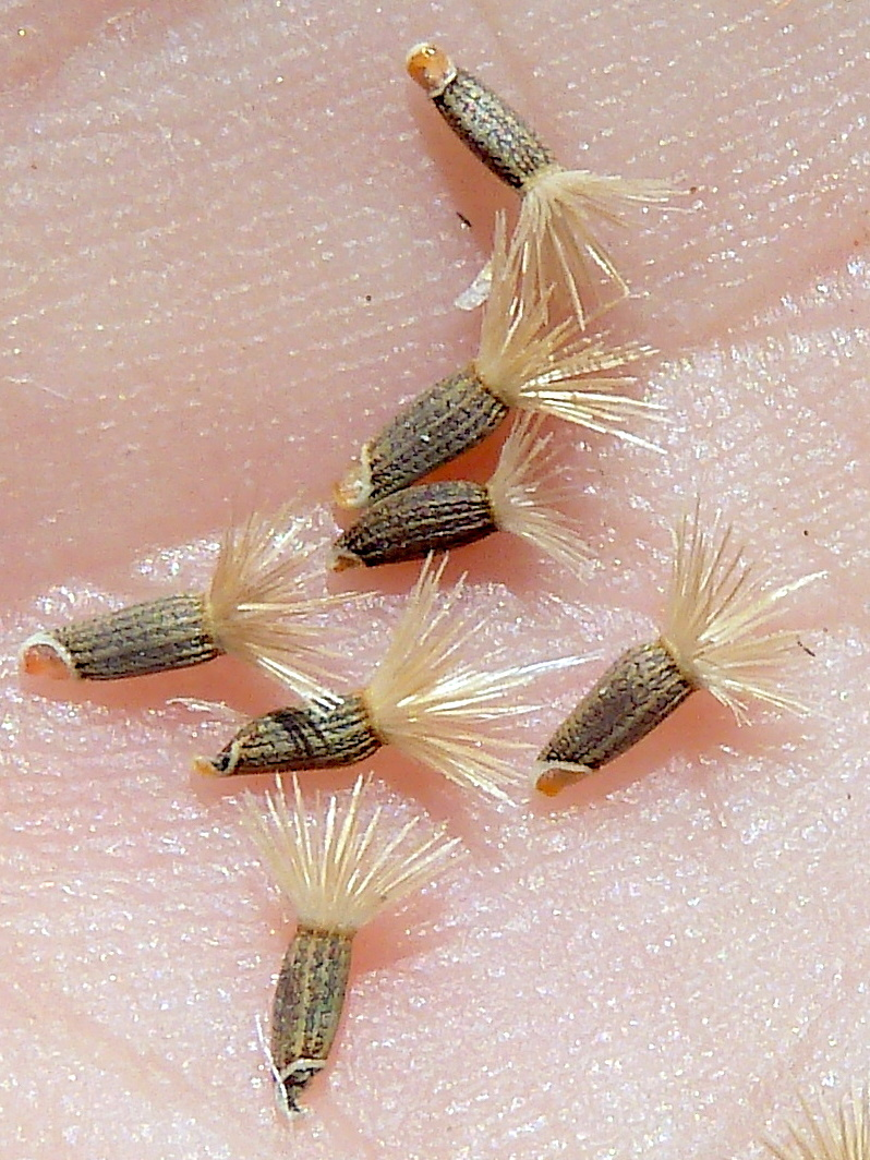 Mantisalca salmantica (cabezuela, pan de pastor, ...) - Cipselas, algunas aún con su eleosoma - Circa Estación de Contenedores de RENFE/ADIF de Abroñigal/Embajadores, Madrid (España).